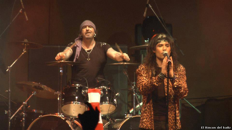 Txus di Fellatio y Zeta en un concierto en Colombia en 2013.